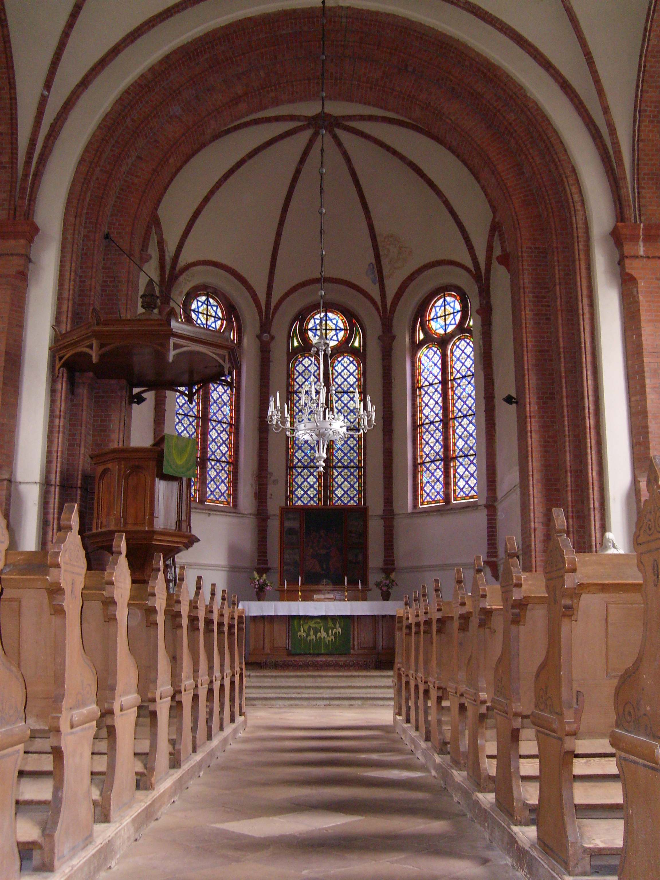 Kirche in Greifswald-Wieck